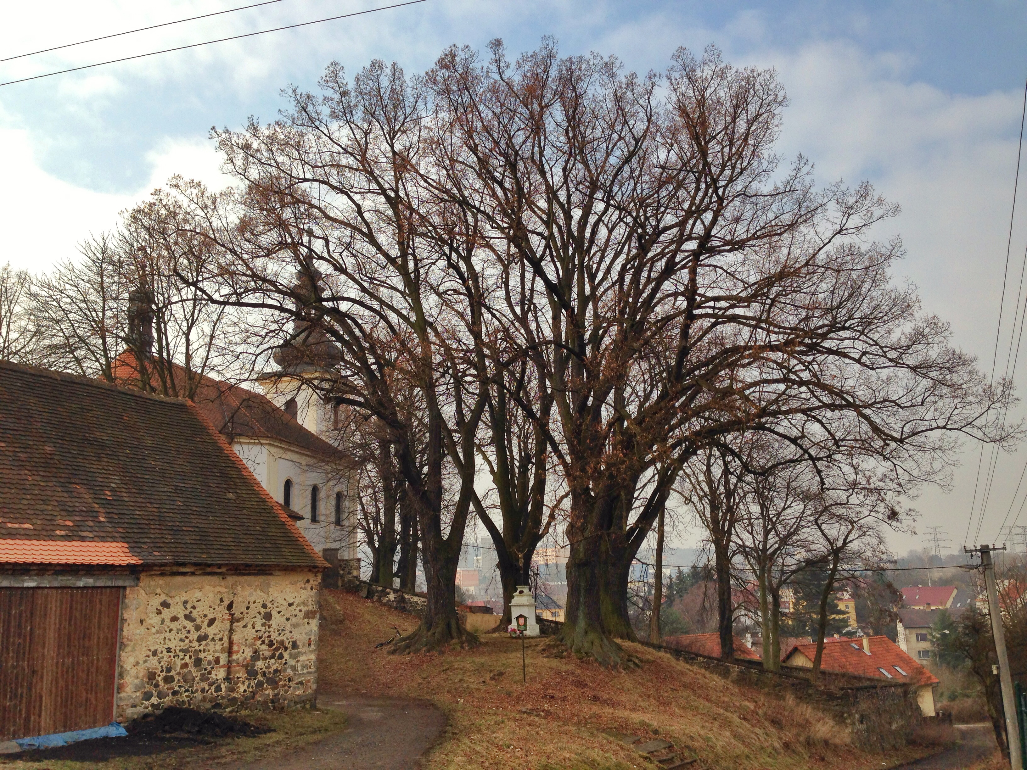 Kostel svatého Václava a čtyři památné stromy lípy velkolisté (Tilia platyphyllos)